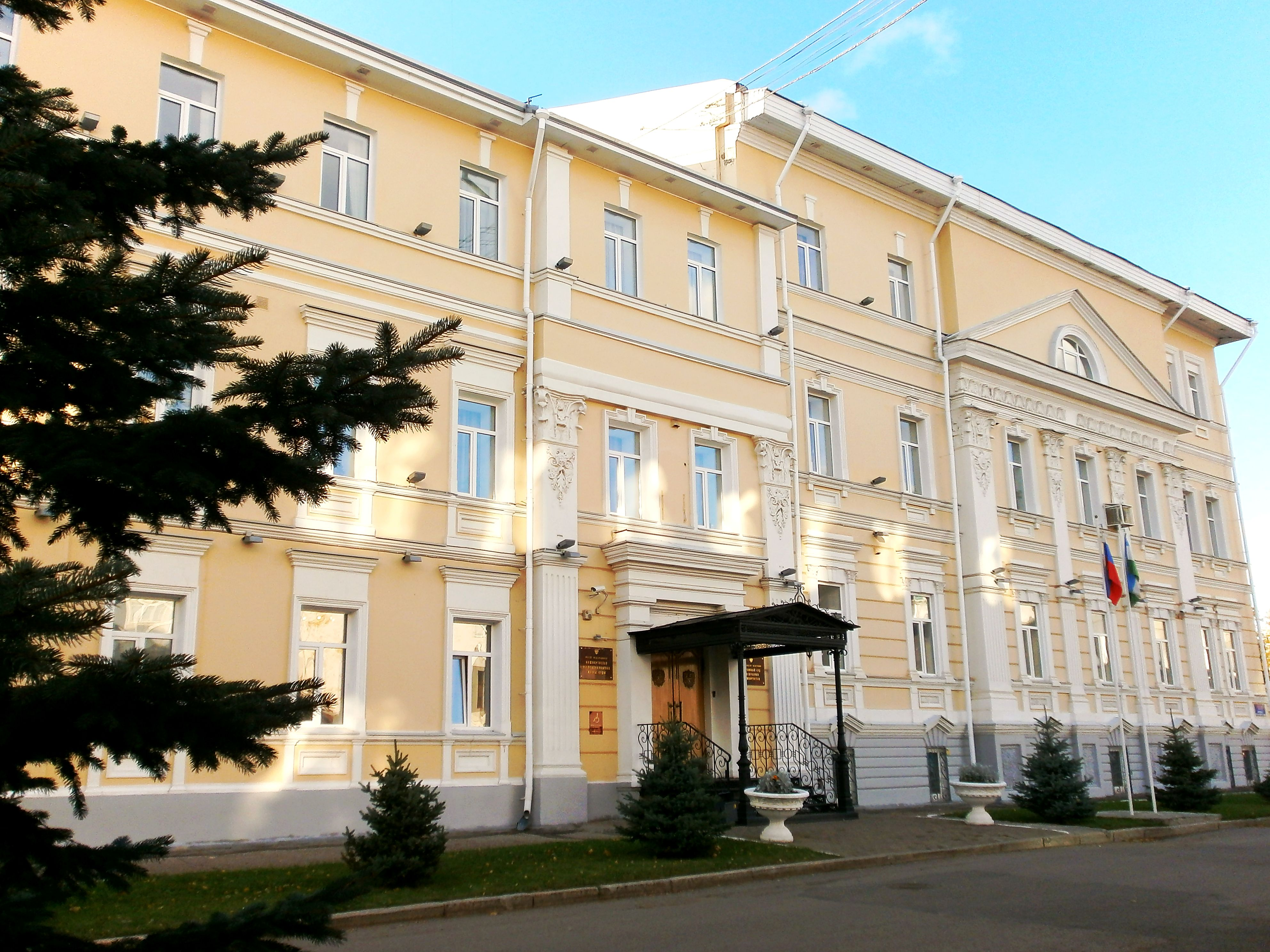 Уфимский губернский Окружной Суд (Республика Башкортостан, Уфа, Тукаева улица, 25)